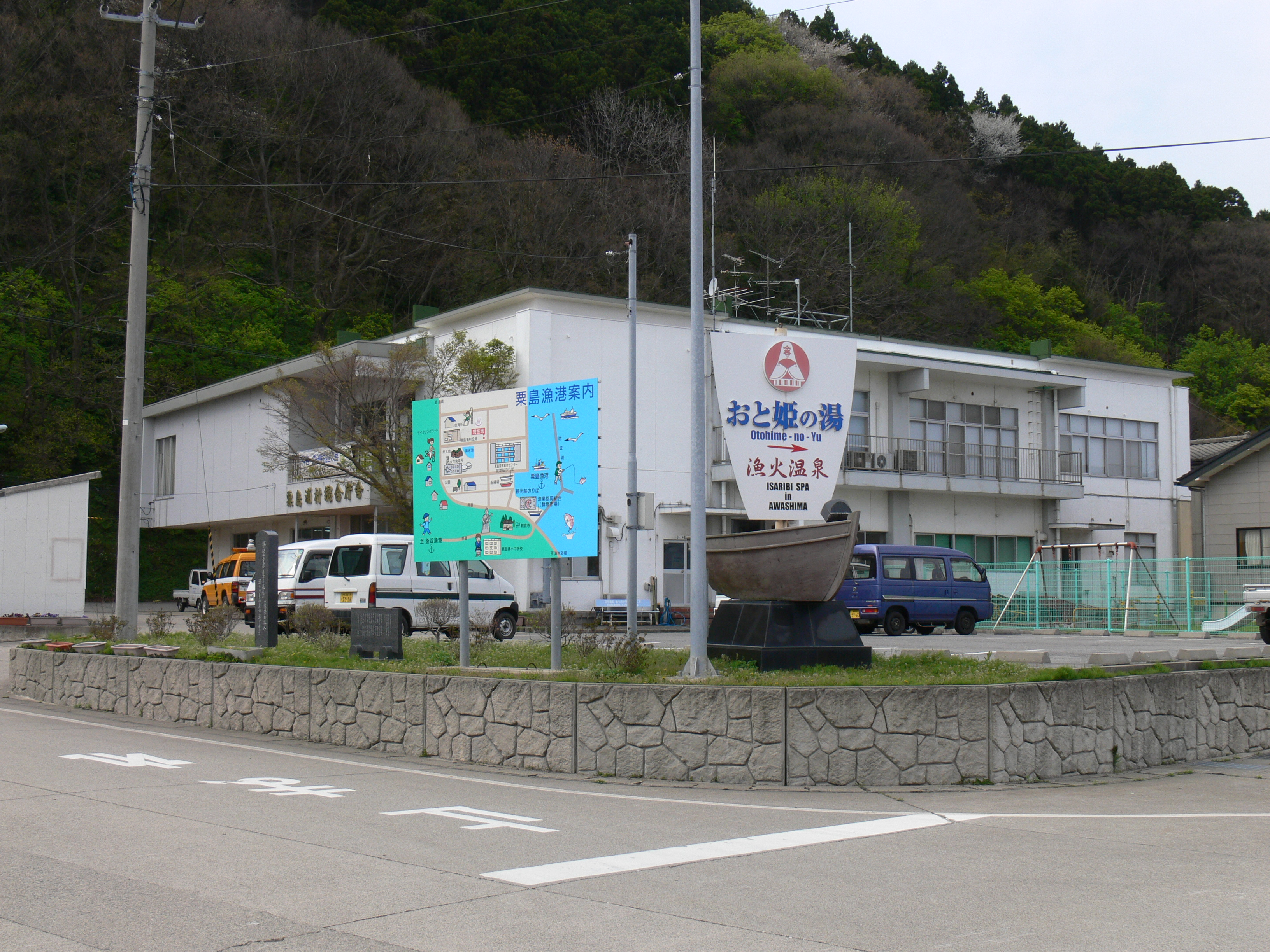 粟島浦村役場